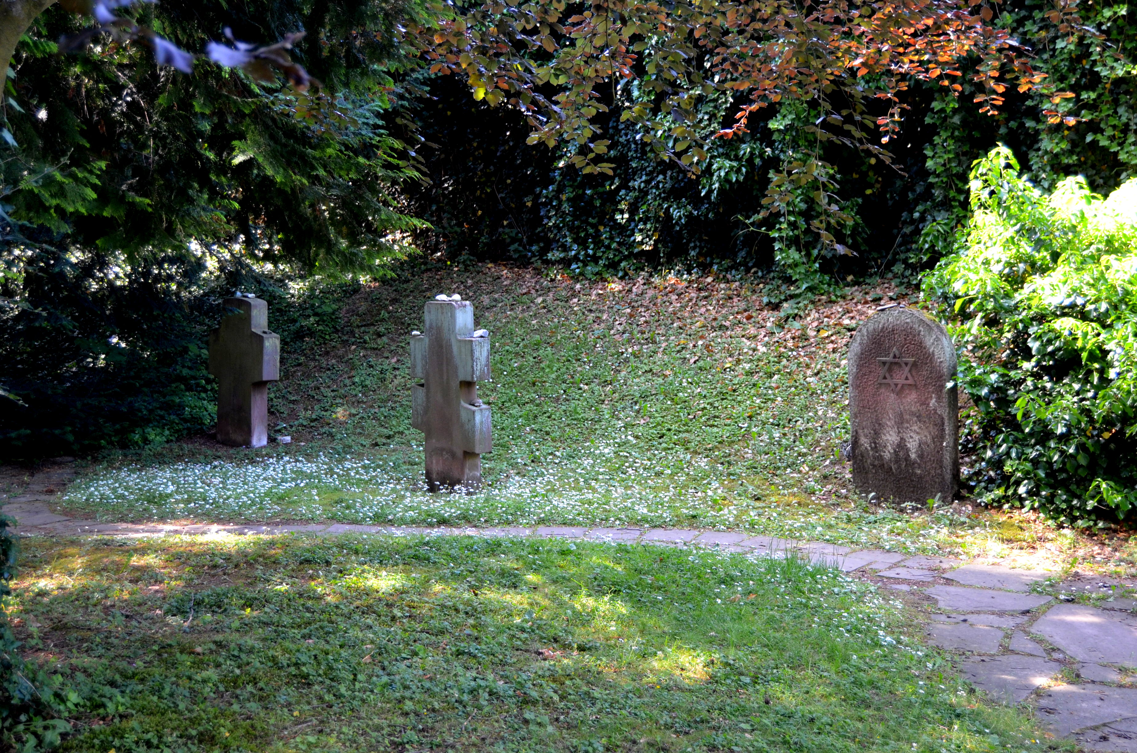 Het kerkhof van het euthanasiecentrum Hadamar